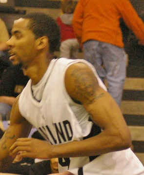 Keith Benson